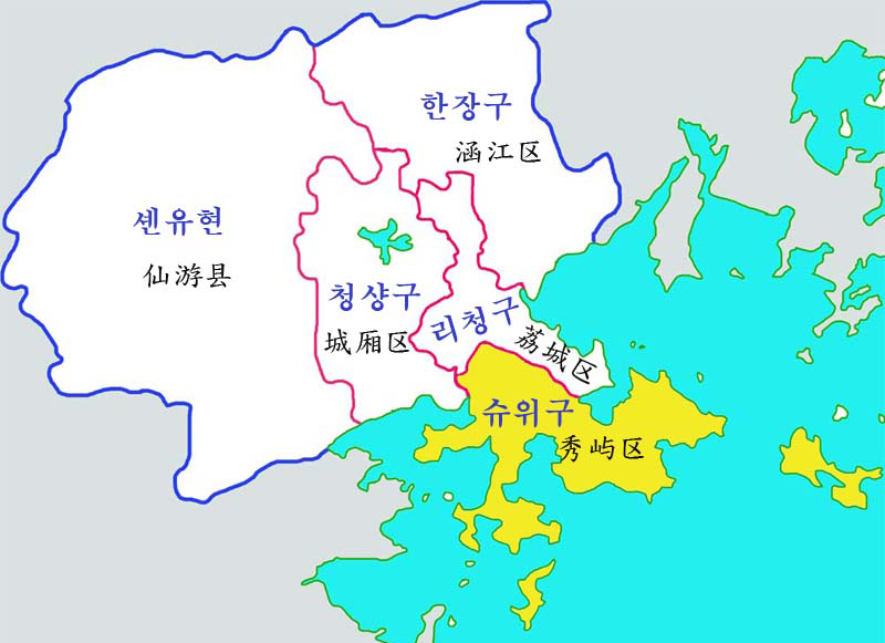 푸텐시 현급구역도